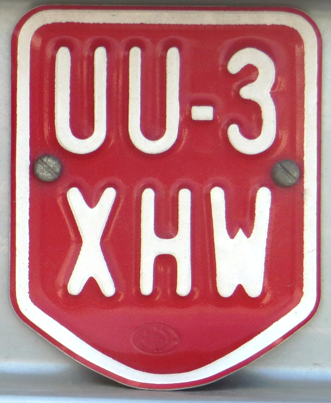 Oud Oostenrijks kentekenplaat